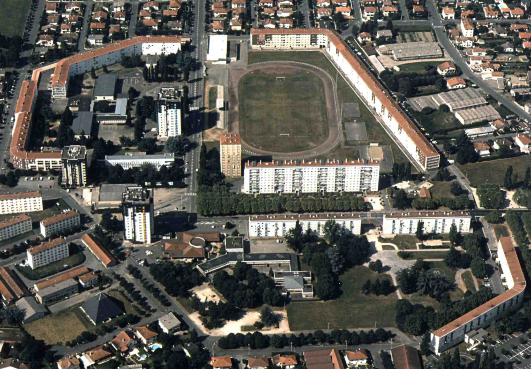 Cité Laubadère, quartier Tarbes Nord avec ses tours, son stade, son école, sa crèche et son centre social.